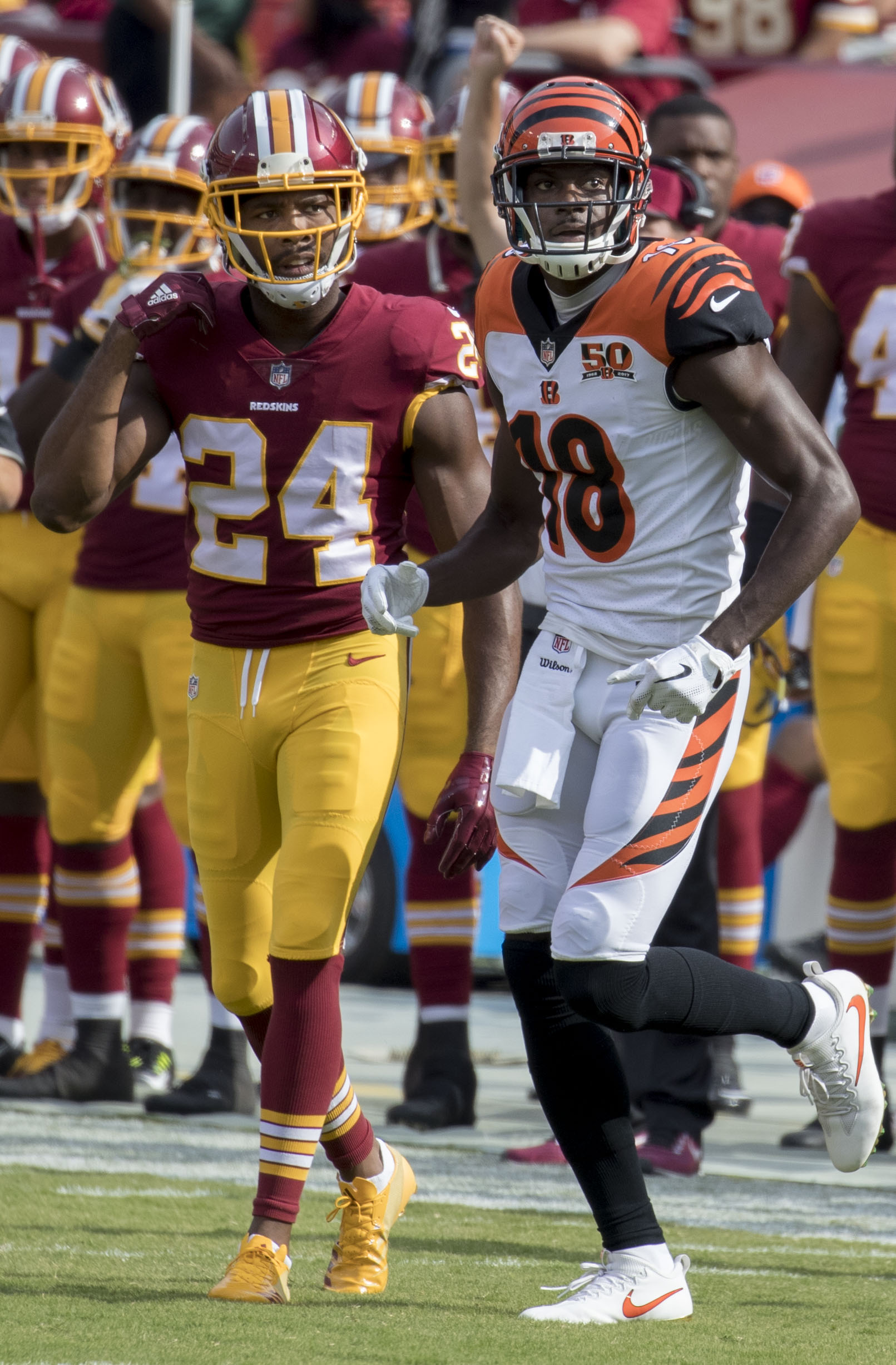 Bengals at Redskins 8/27/17